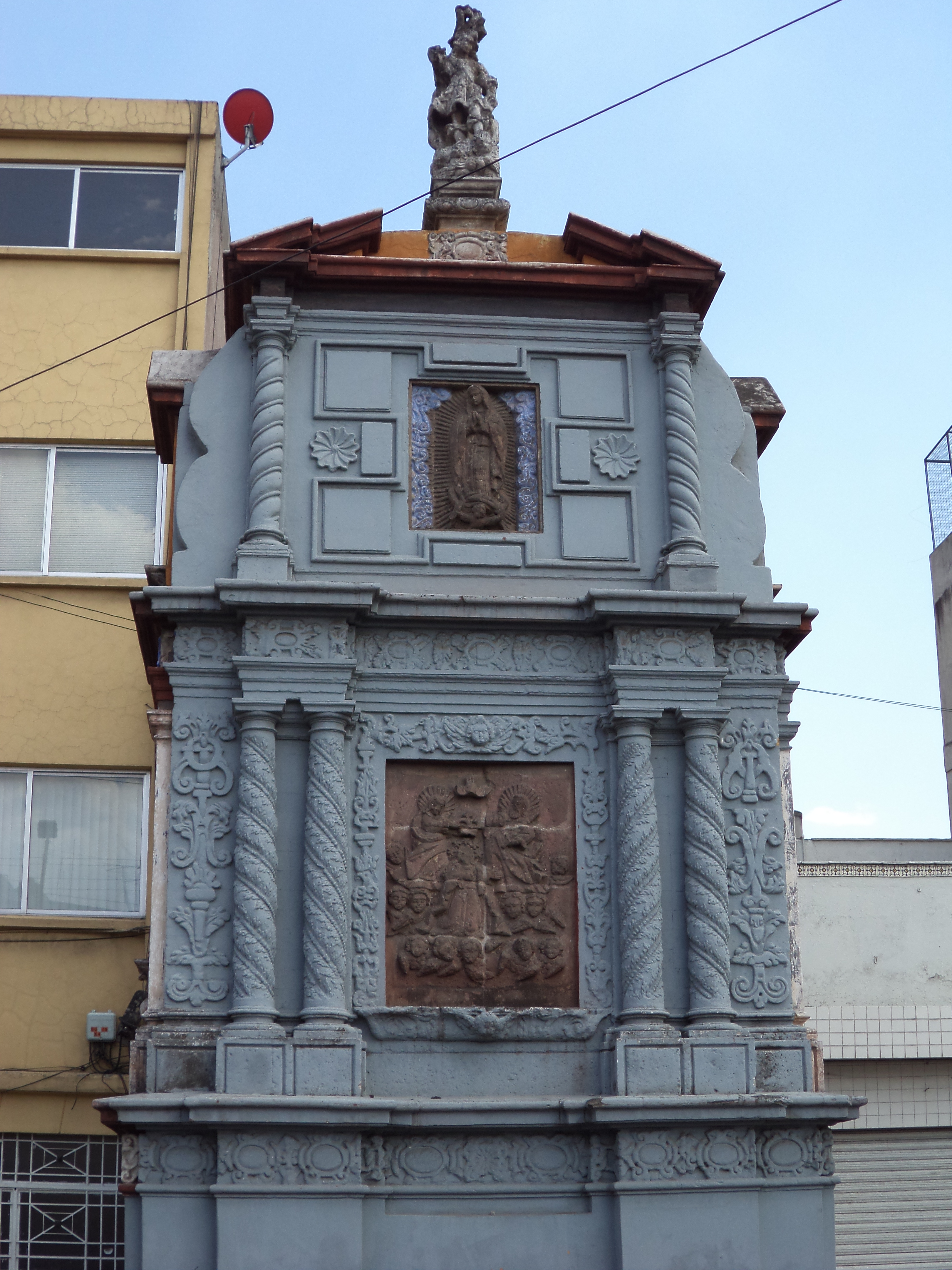 Misterio 15 La Coronación de Nuestra Señora